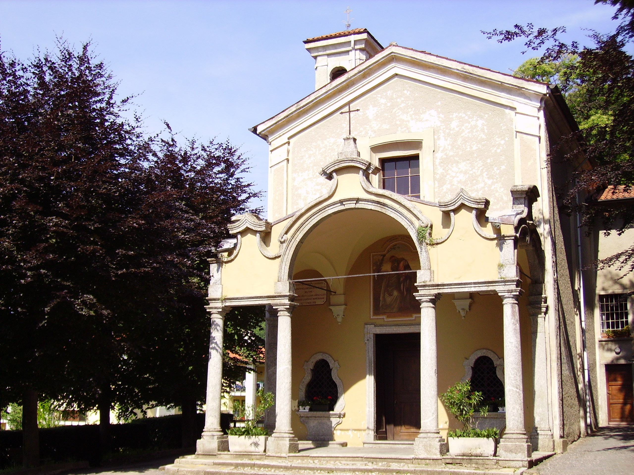 Chiesa in località Lazzaretto edificata per raccogliere le ossa dei morti di peste